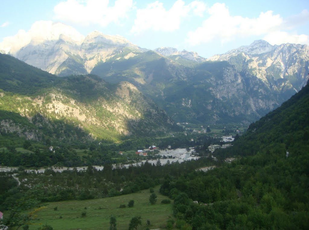 Lugina e Thethit